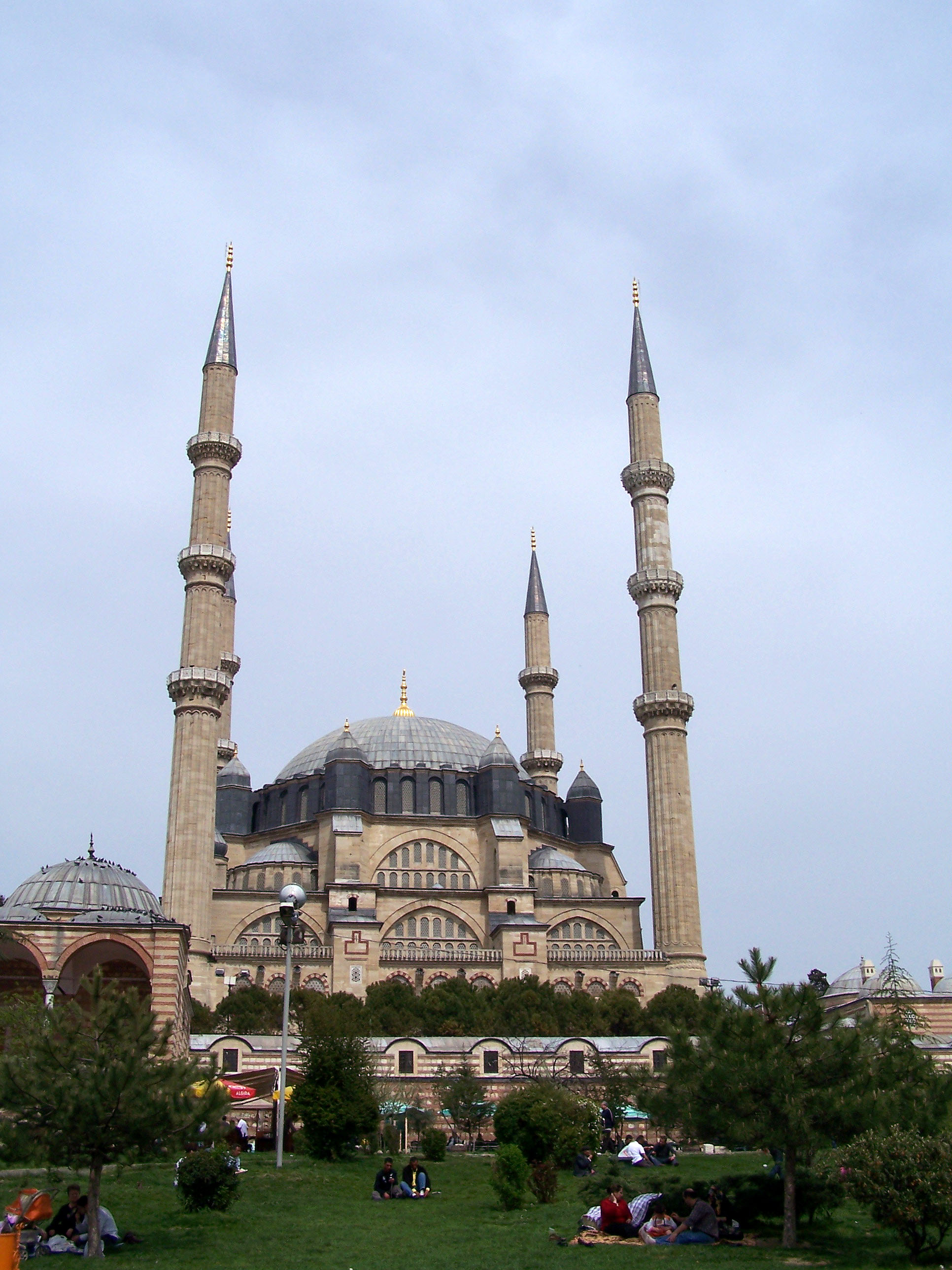 Selimiye Camii in Edirne, Turkey